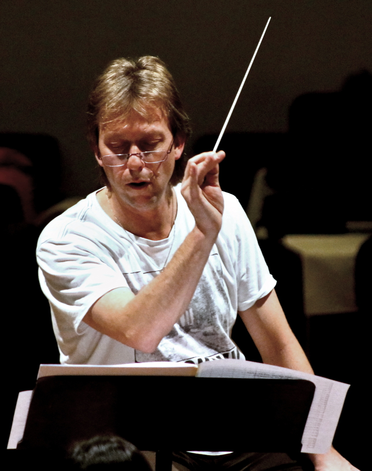 Martin Kumžák při zkoušce, KD Ládví, 18. listopadu 2016